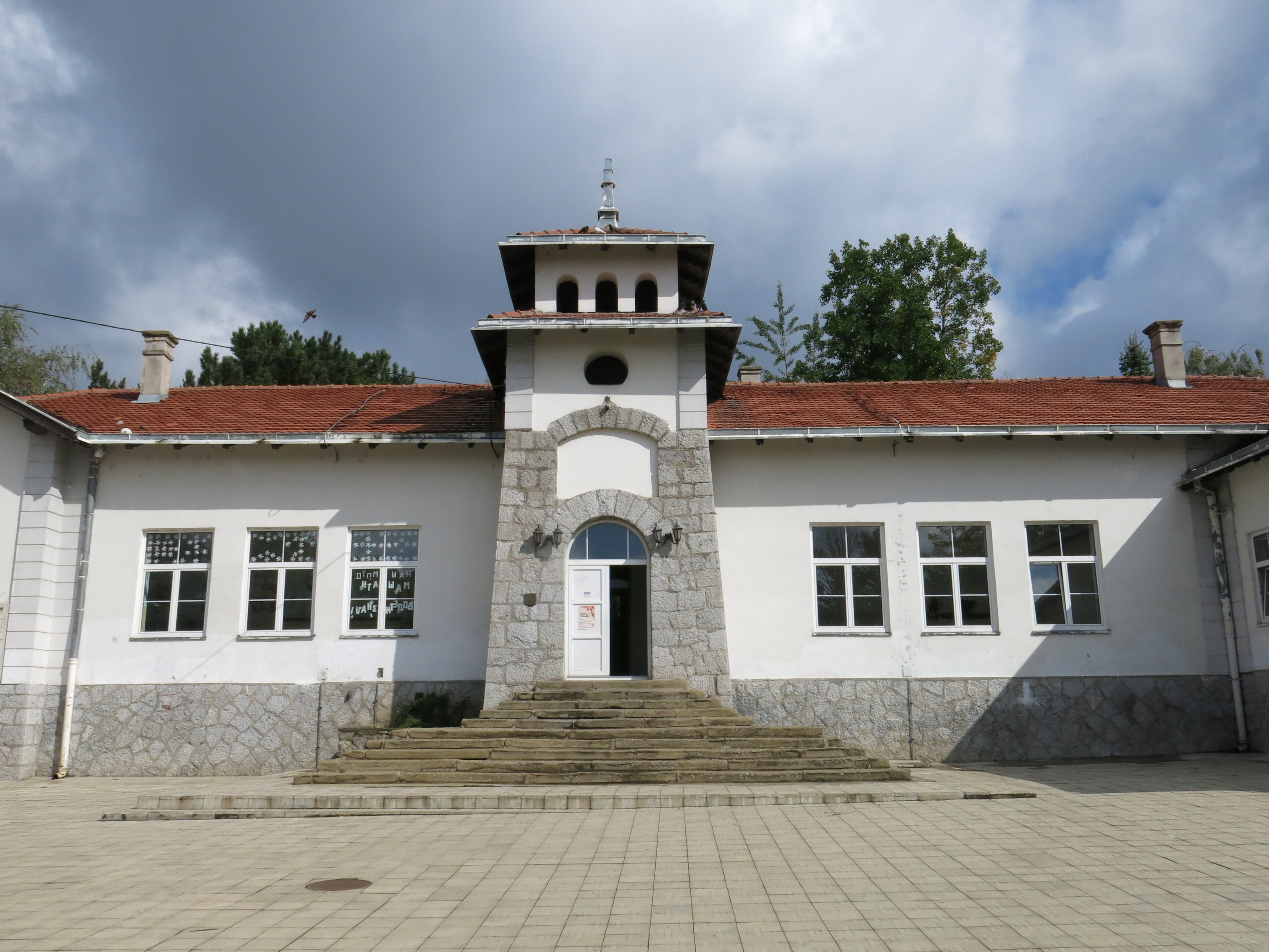 Основна школа „Љуба Ненадовић“